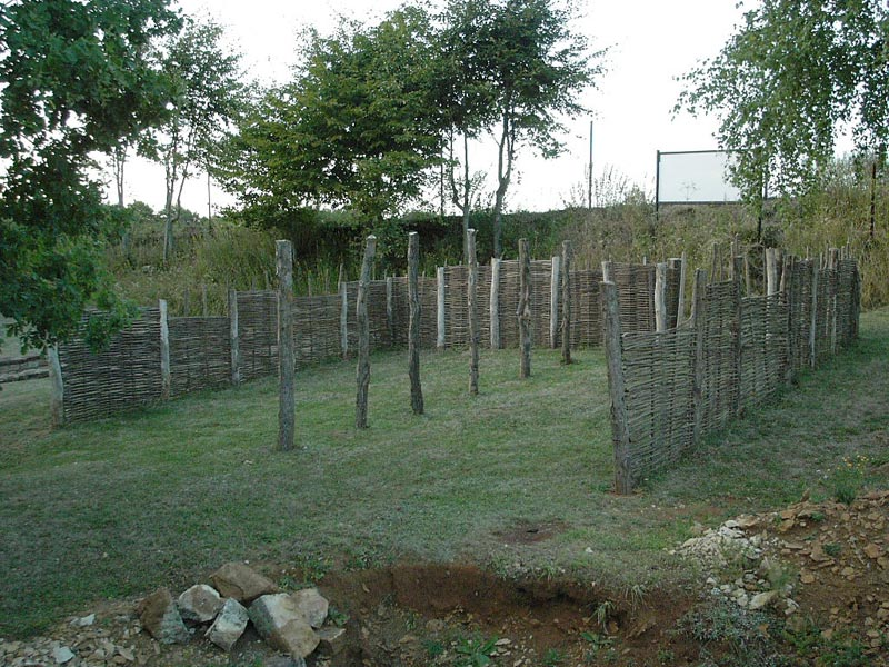 Rekonstruktioun vun engem Haus.